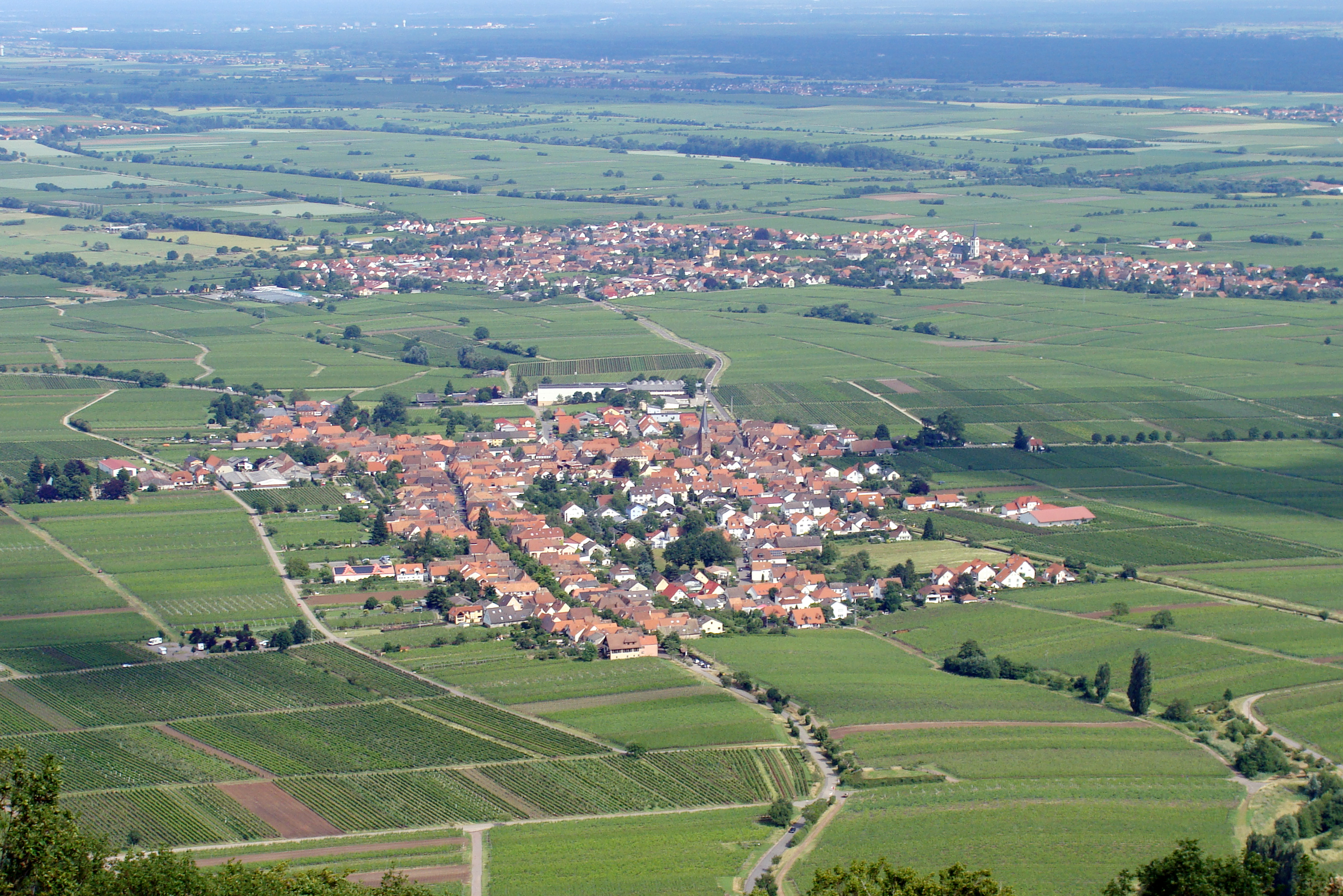 Rhodt unter Rietburg - Gesamtansicht (Blick von der Rietburg, im Hintergrund Edesheim)